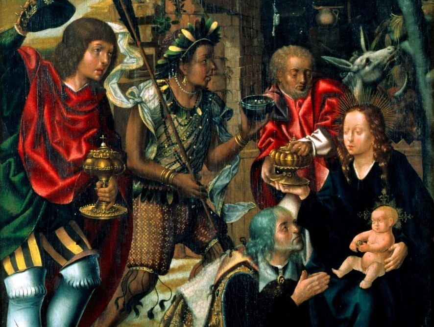 Adoração dos Reis Magos (pormenor)